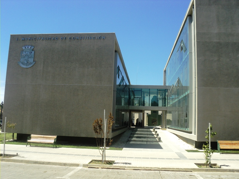 Nuevo edificio de la Municipalidad de Constitución (Chile)